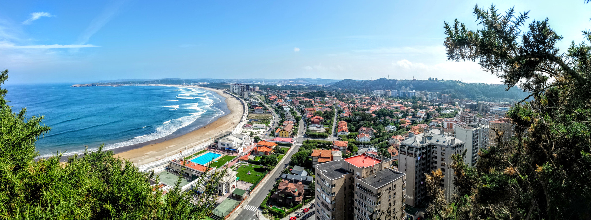 500px provided description: Salinas